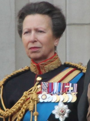 2013年6月15日のプリンセス・ロイヤル、アン。